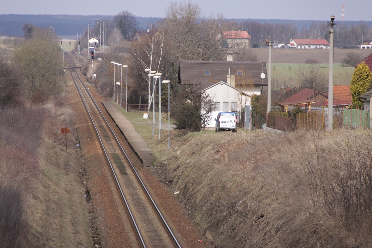 Template:De(1=Betriebsbahnhof Chotěšov u Stoda und Haltepunkt Chotěšov u Stoda, früher Chotieschau-Mantau